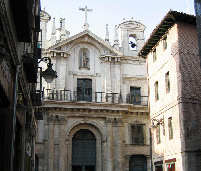 Valladolid – España (Spain) - Iglesia de la Vera Cruz: La iglesia primitiva fue diseñada por Pedro Mazuecos y construida en el año 1595. Fachada diseñada por Juan de Nates, el balcón fue realizado por el rejero Juan del Barco en 1596. En 1667 comenzó la ampliación del interior siguiendo los planos del arquitecto Juan Texedor , finalizándose en 1681.